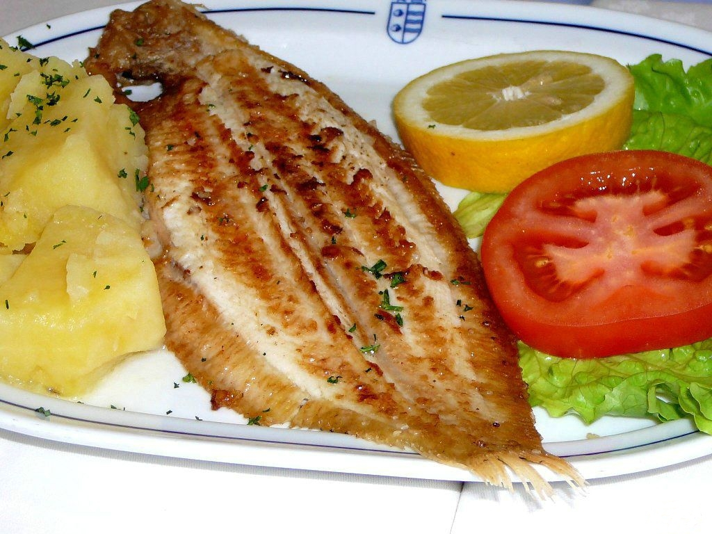 Un plato de lenguado a la plancha.